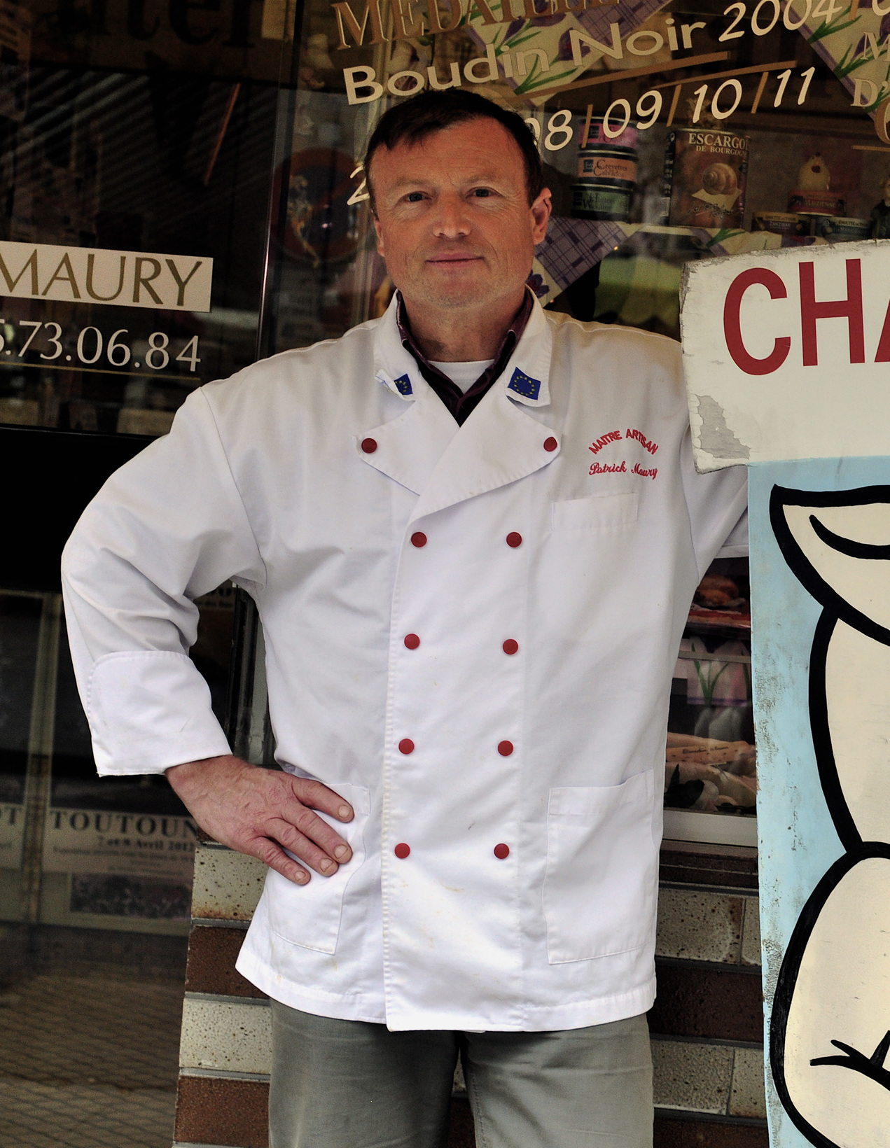 Patrick Maury devant sa petite charcuterie réputée du centre de Troyes (photographié en 2012). Il rappelle volontiers ses innombrables titres nationaux et internationaux, d'ailleurs signalés sur sa vitrine et rappelés par des bien des trophées. Proclamé "roi de l'andouillette artisanale aux chaudins de porc" par l'auteur et chroniqueur gastronomique Gilles Pudlowski, notamment sur son blog Les pieds dans le plat (14 mai 2011), il a été l'une des vedettes de l'émission télévisée Ici et pas ailleurs le 17 janvier 2016.